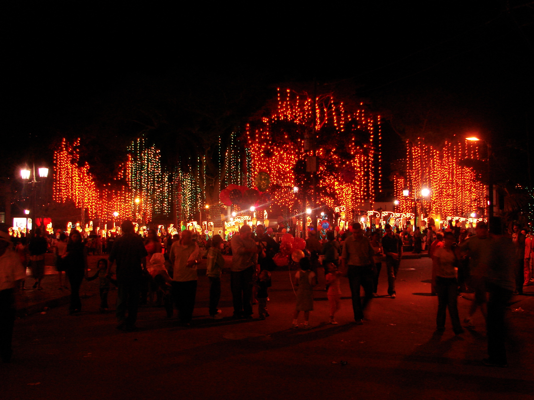 Parque principal del municipio de Bello, en diciembre 2007, ColombiaBELLO - ANTIOQUIA